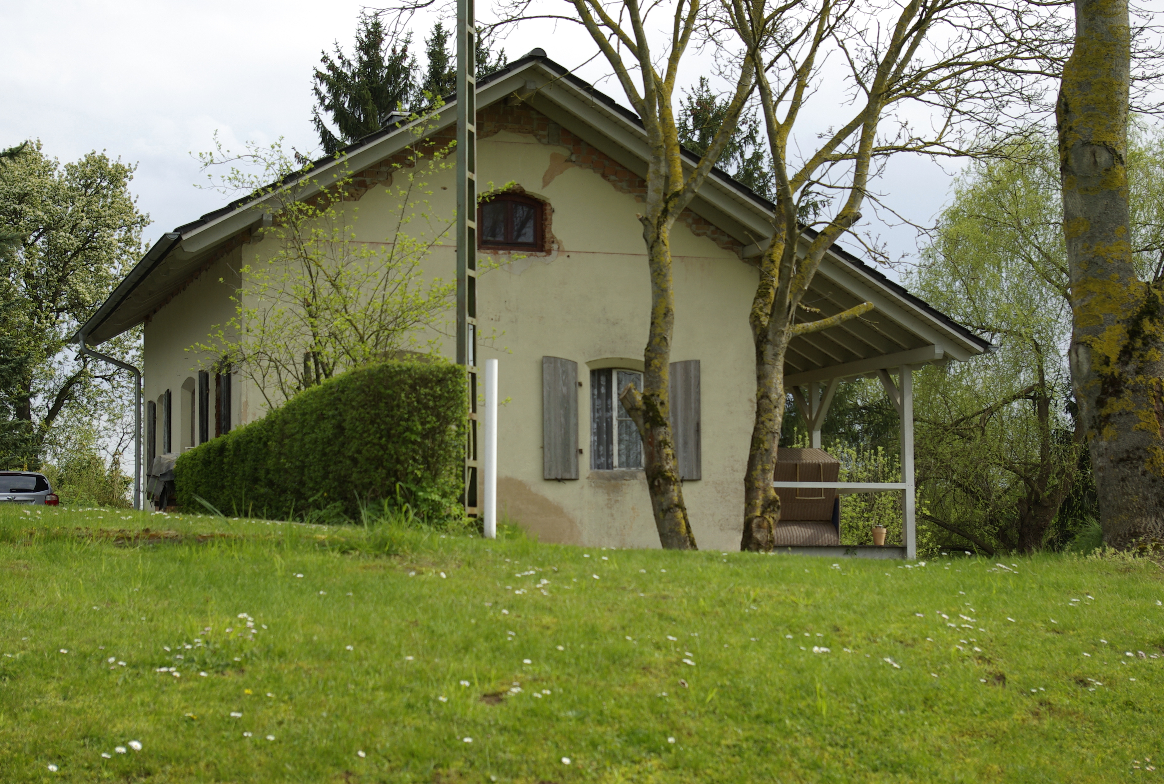 Schleusenwärterhaus der mit Erde verfüllten Schleuse 95 in Neuses an der Regnitz (Markt Eggolsheim).